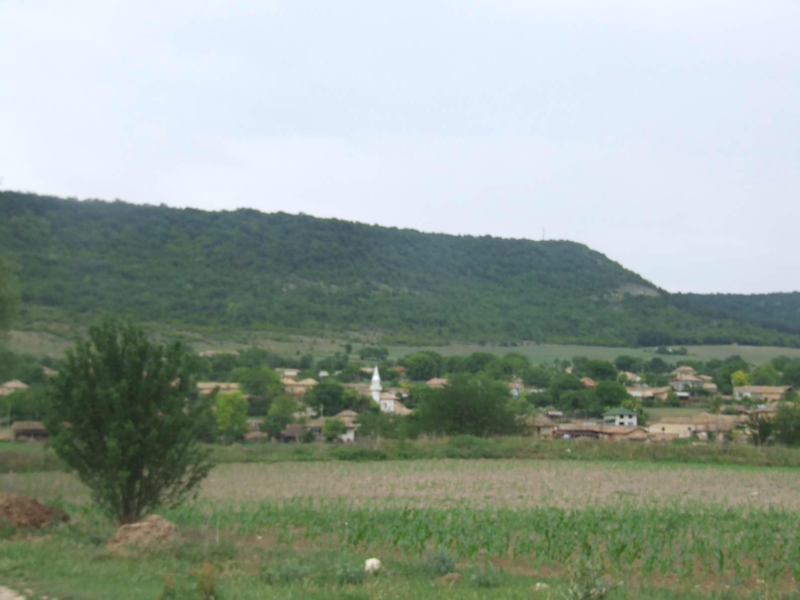 Поглед към село Захари Стояново, Поповско - 2007 год.